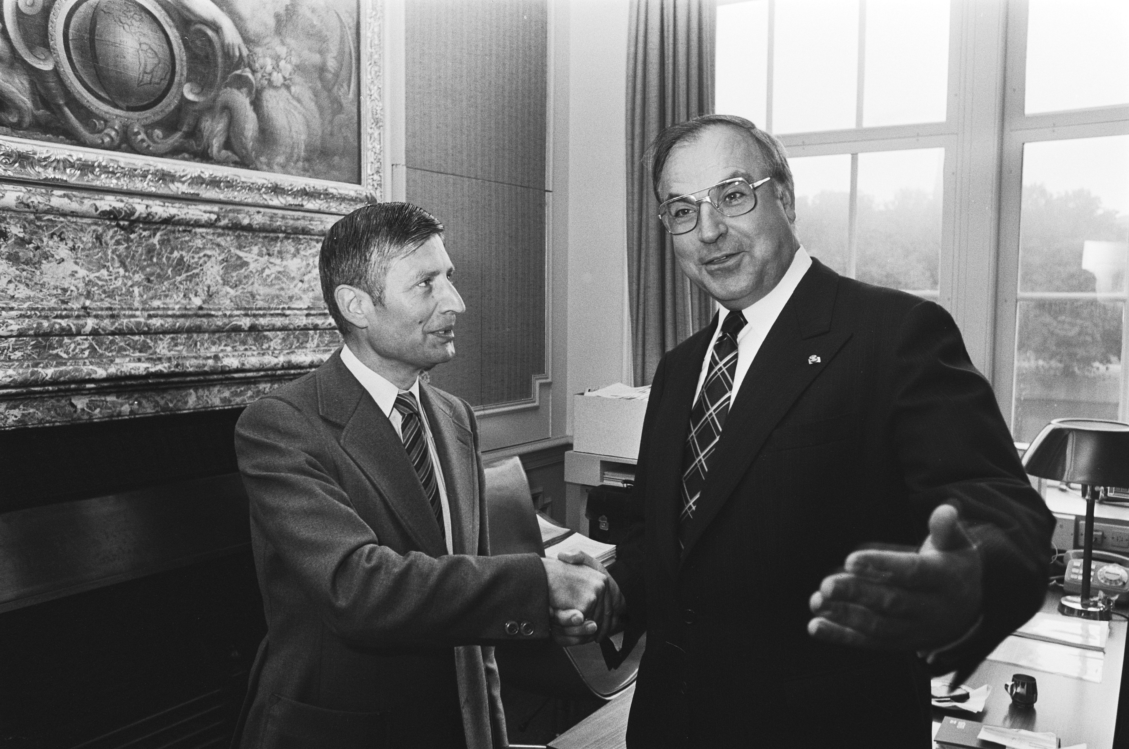 Collectie / Archief : Fotocollectie Anefo Reportage / Serie : [ onbekend ] Beschrijving : Premier Van Agt ontvangt Westduitse CDU-voorzitter Helmut Kohl Datum : 13 september 1978 Trefwoorden : ontvangsten, politici Persoonsnaam : Agt, Dries van, Helmut Kohl Fotograaf : Verhoeff, Bert / Anefo Auteursrechthebbende : Nationaal Archief Materiaalsoort : Negatief (zwart/wit) Nummer archiefinventaris : bekijk toegang 2.24.01.05 Bestanddeelnummer : 929-8963